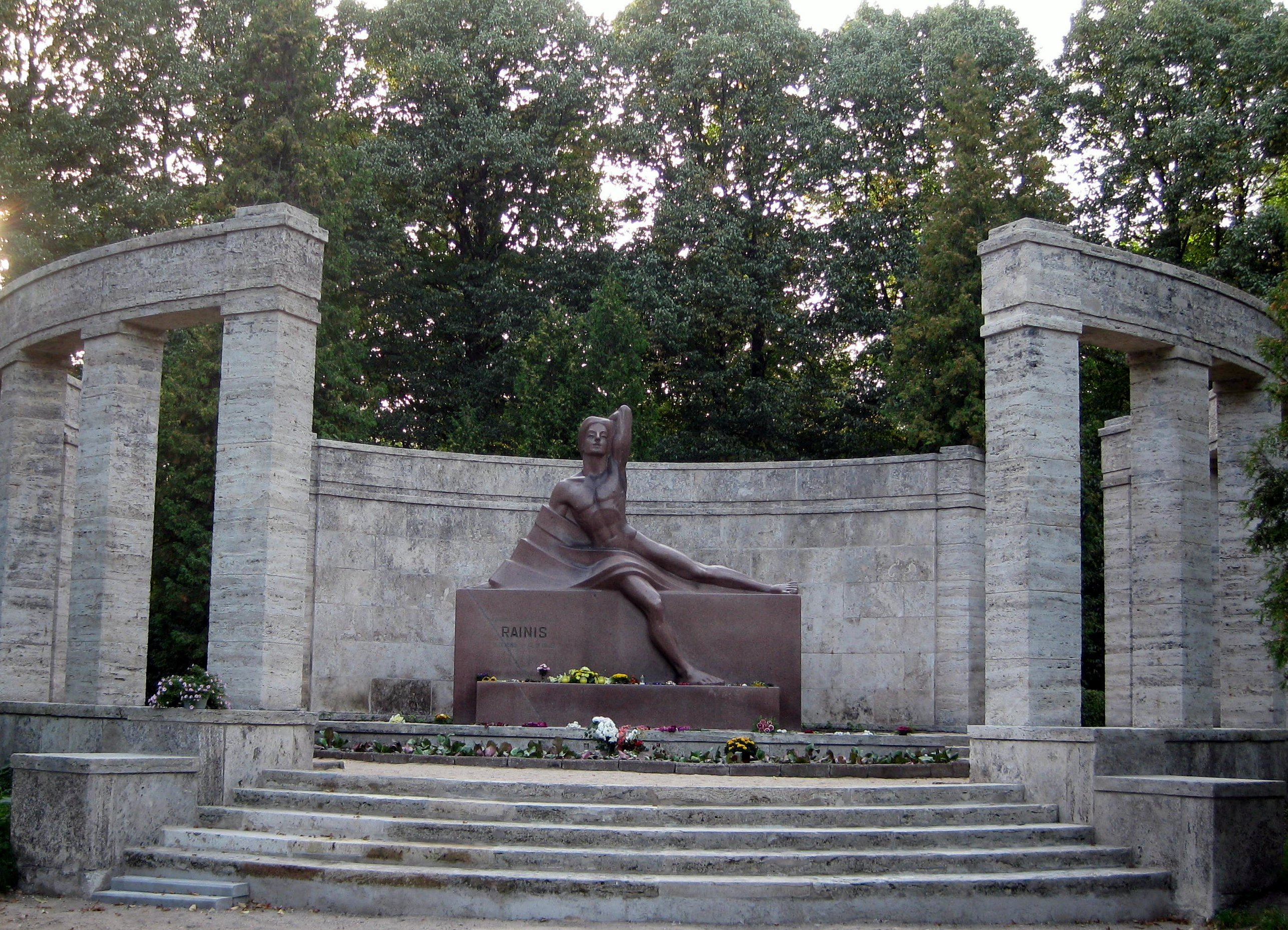 Raiņa kapu ansamblis t. sk. vārti, administratīvā ēka, kapliča, krematorija, Rīga, Aizsaules iela 1a